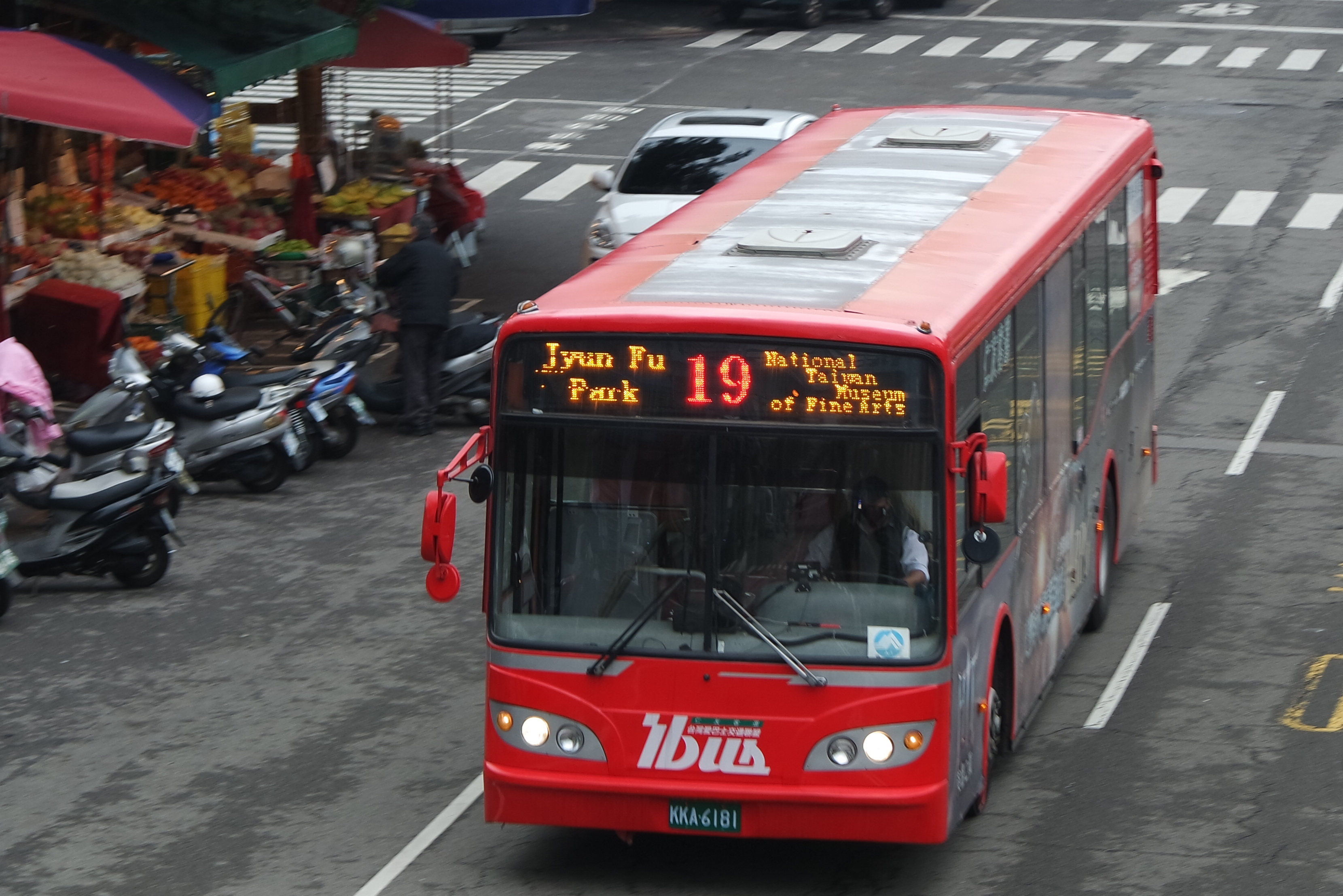 仁友客運KKA-6181行駛台中市公車19路